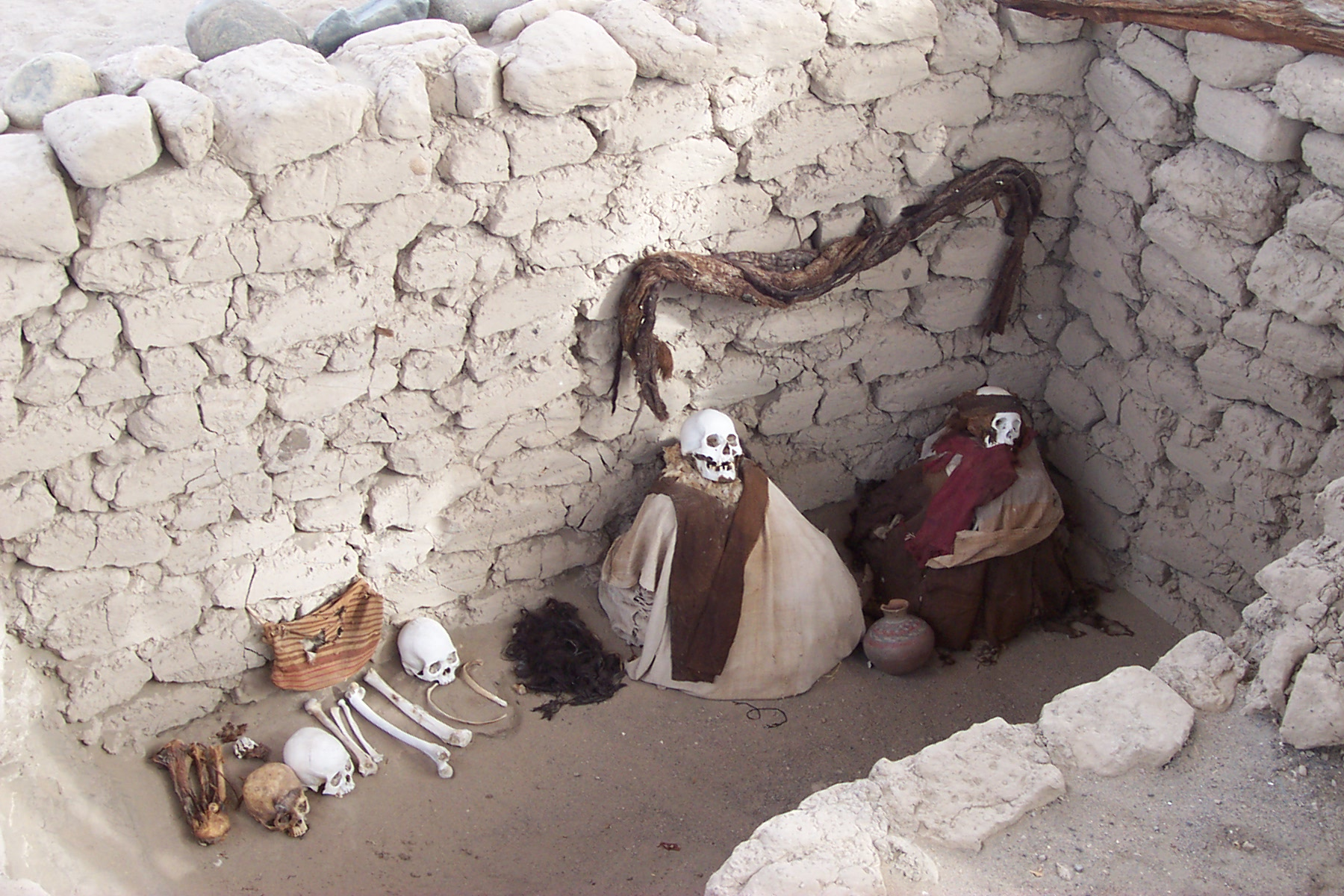 Eigen foto